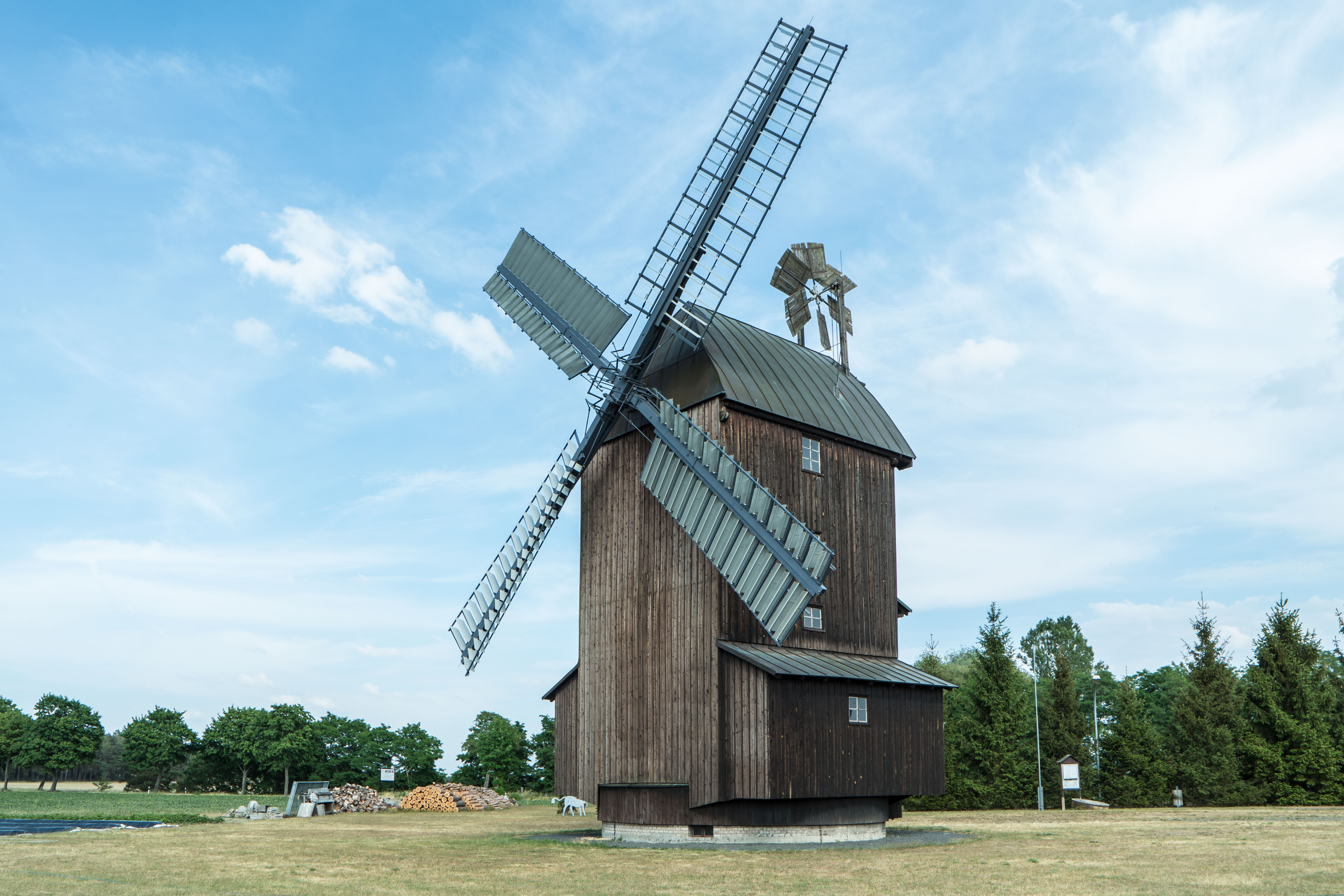 Paltrockmühle, Straße der Jugend 7 in Schönewalde Bemerkung: Erbaut 1815 in Baruth/Mark OT Ecksdorf. 1939 versetzt nach Schönewalde und dabei Umbau von einer Bockwindmühle zur Paltrockmühle.